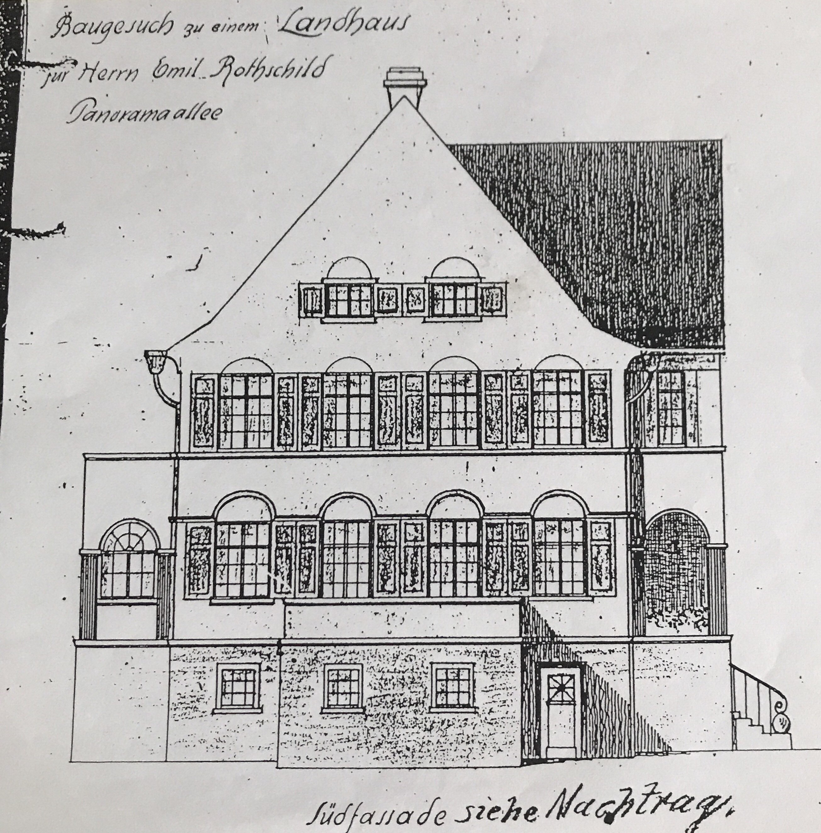 Zeichnung aus dem Bauantrag der Villa